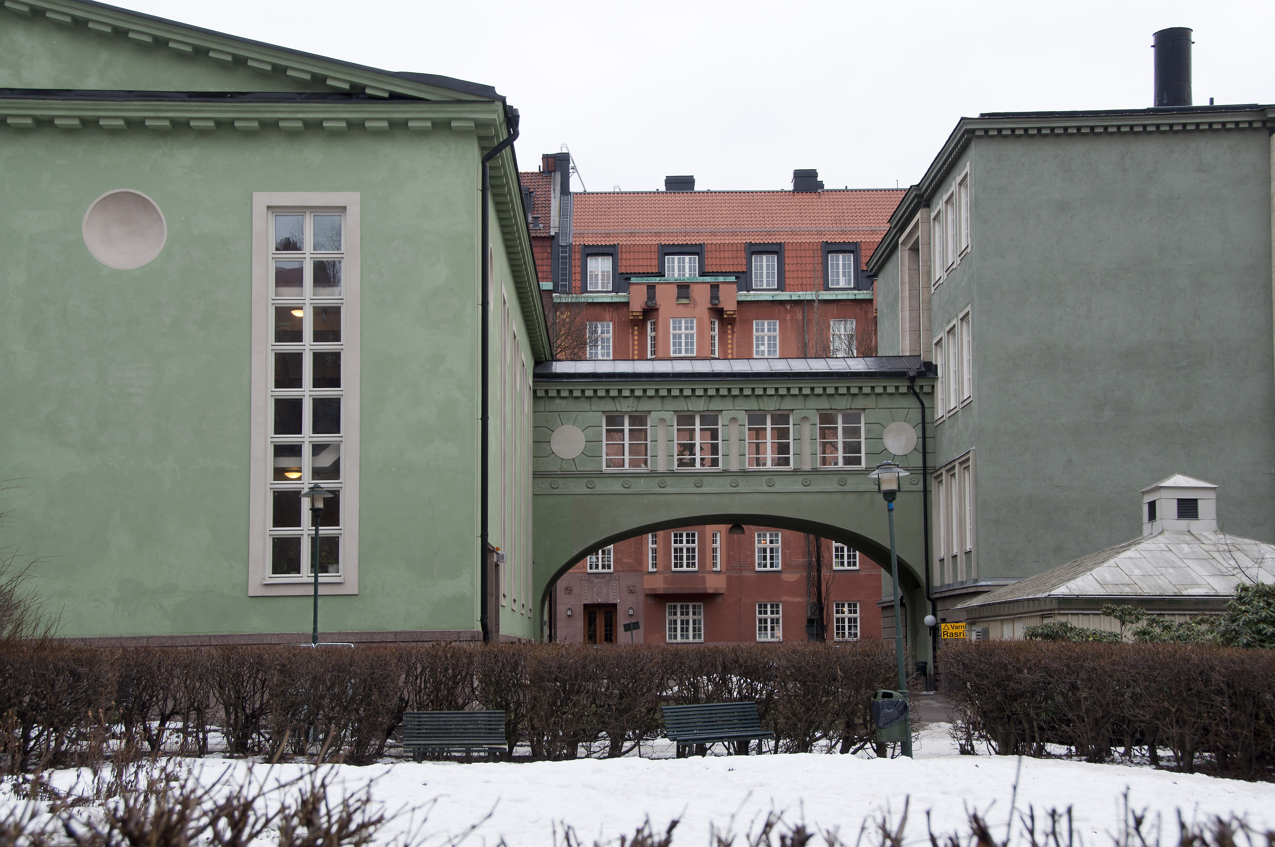 Borgarskolan, Kungstensgatan 2-8, Karlavägen 8-10, Birger Jarlsgatan 70-76. Byggnadsår 1930-32, arkitekt Knut Nordenskjöld, byggherre Stiftelsen Stockholms Borgarskola, byggmästare O Engkvist